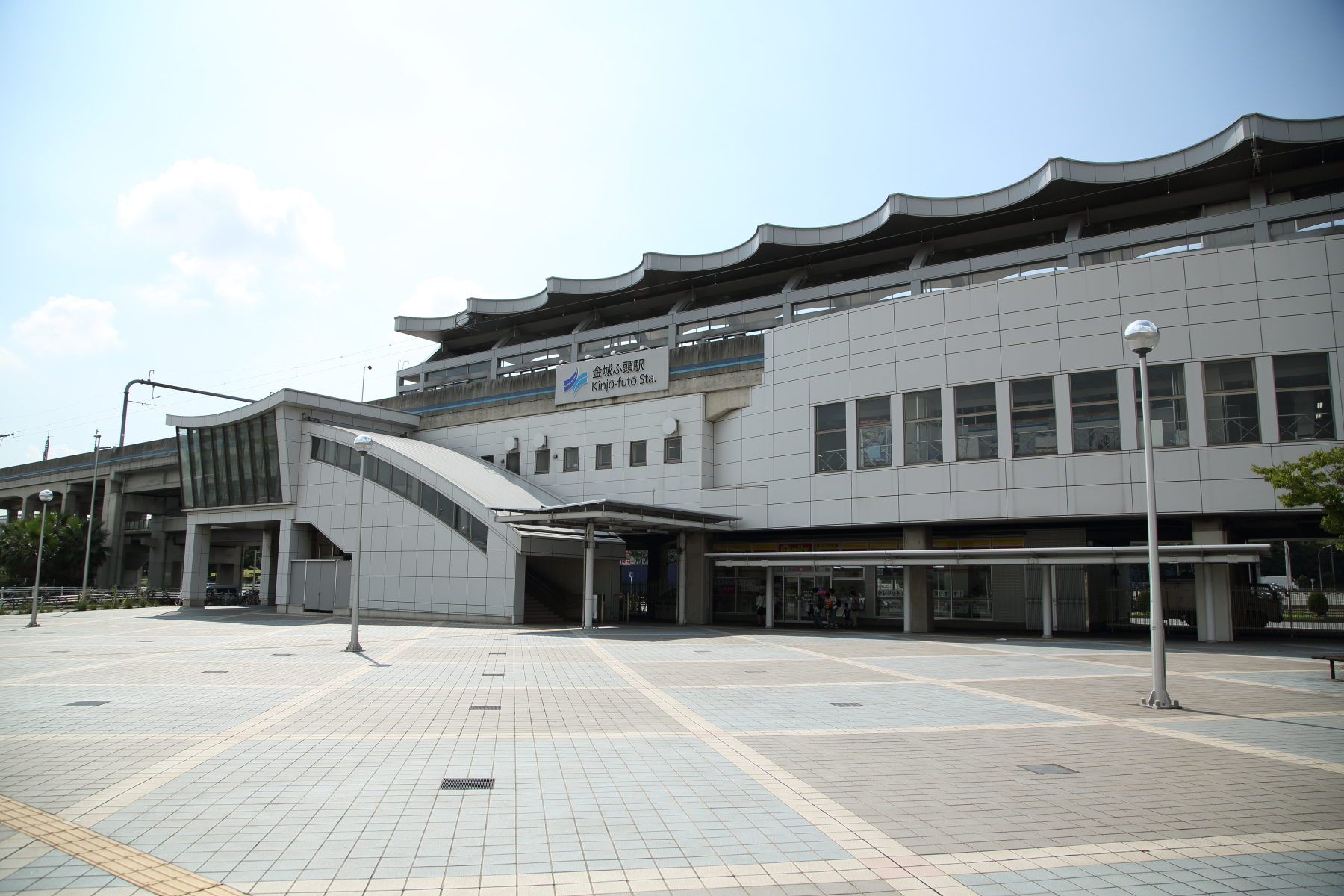 日本の愛知県名古屋市港区金城ふ頭三丁目2番に所在する、名古屋臨海高速鉄道西名古屋港線（あおなみ線）、金城ふ頭駅。